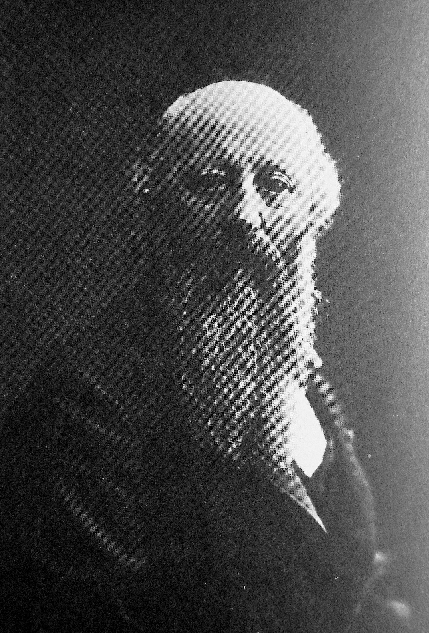 Portrait de Jean-Joseph Bellel (noté François Bellel) . Photographie par Nadar, 1876. Bibliothèque nationale de France, cabinet des estampes (Na 238/202).